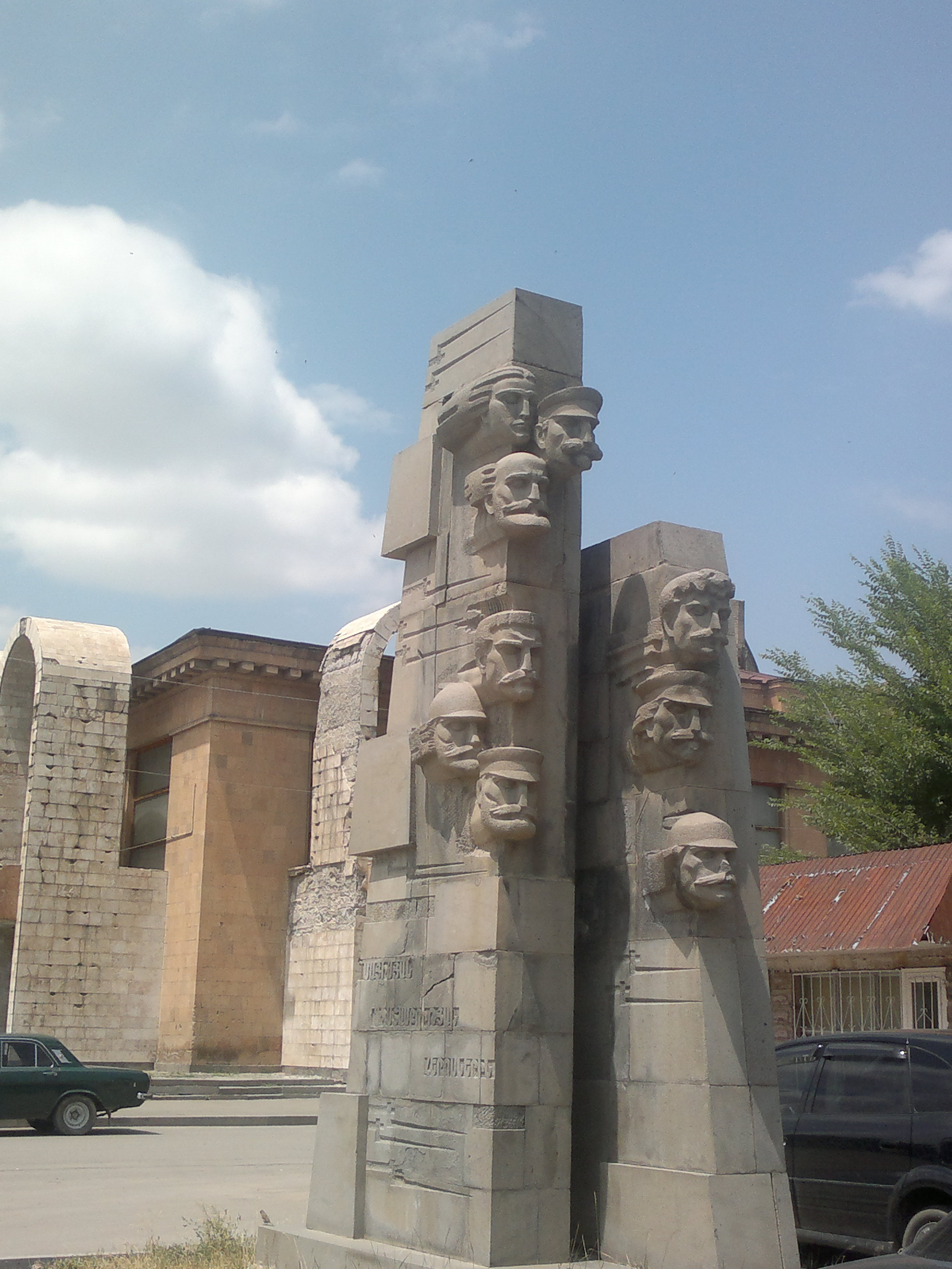 Մայիսյան ապստամբերի հուշարձան 1/4.886